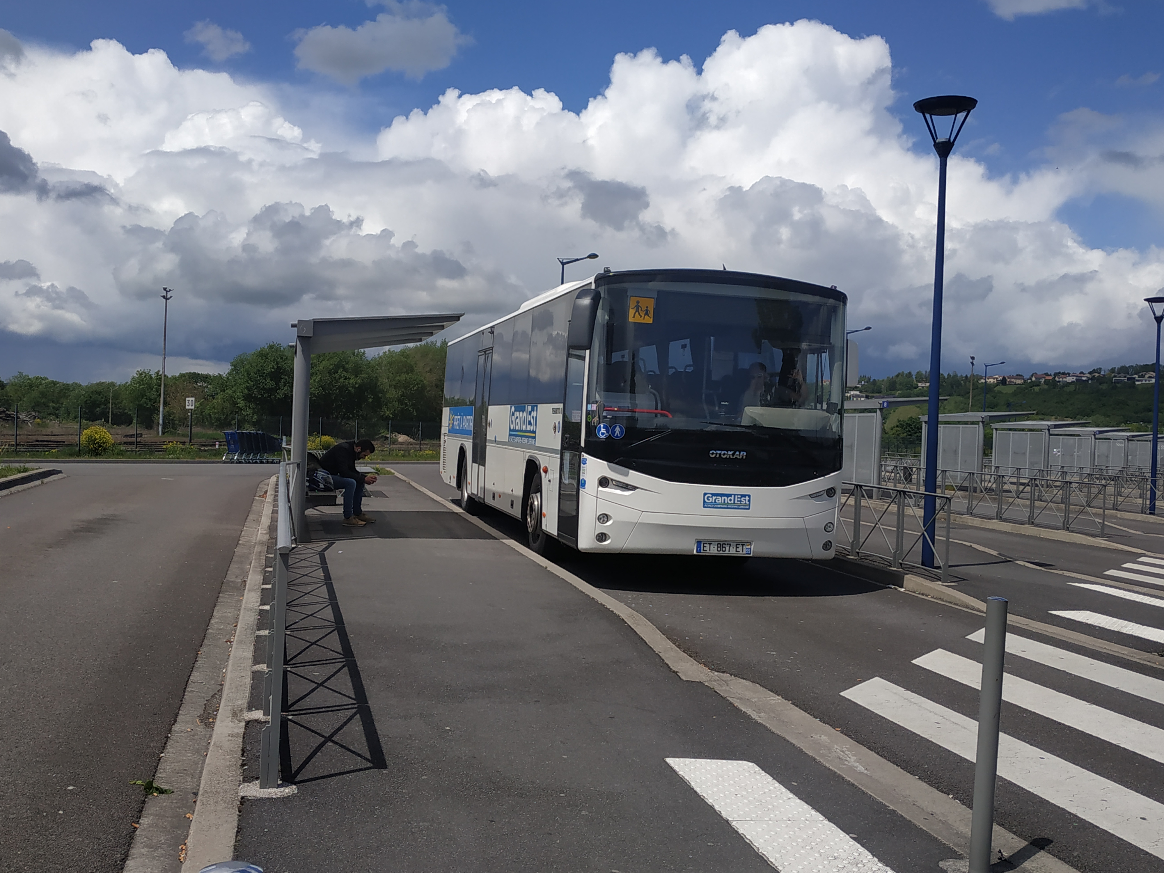 Véhicule de la marque Otokar à la gare routière de Verdun